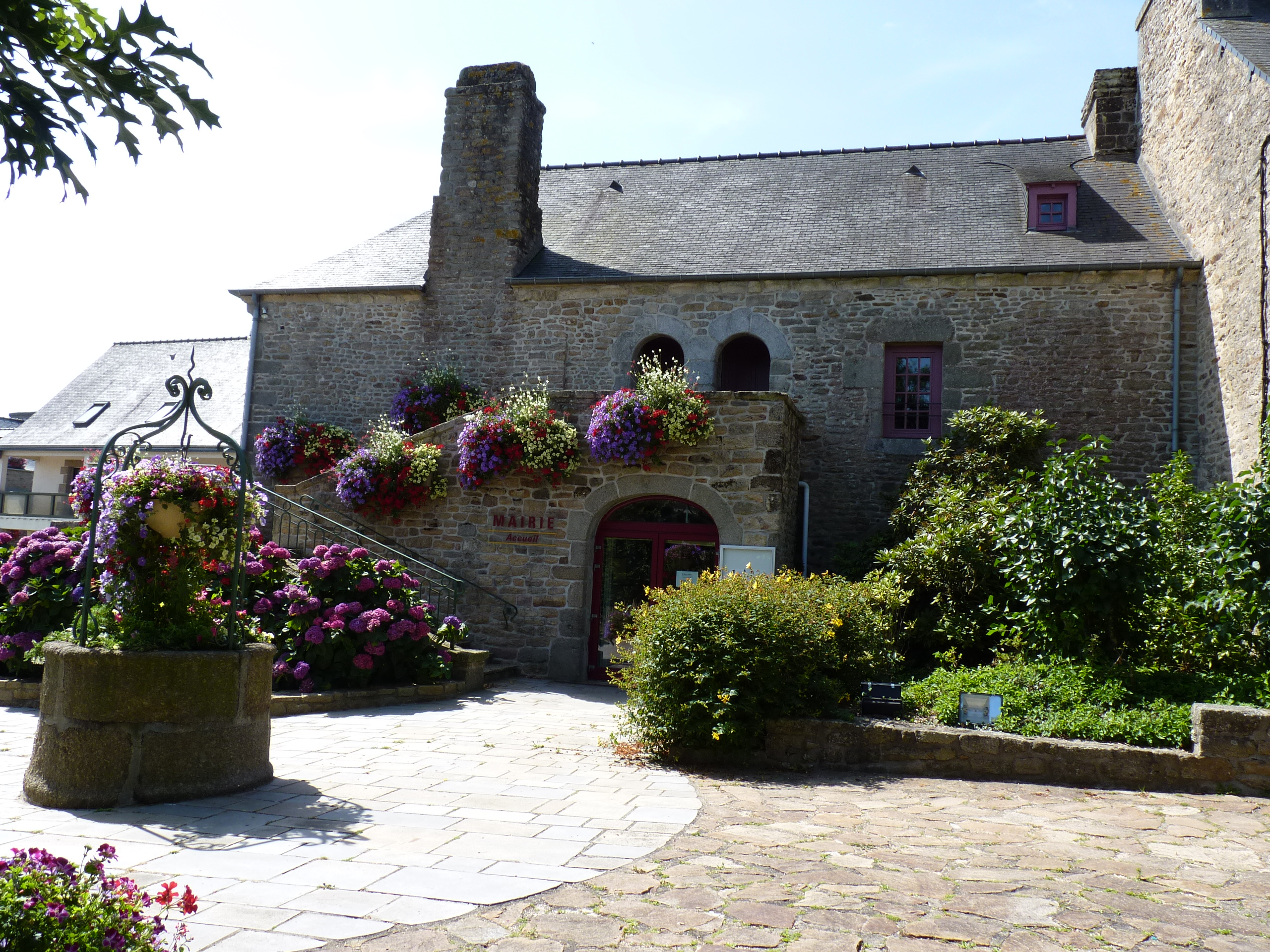 Maison du 17ème siècle. Aujourd'hui mairie de Collinée.